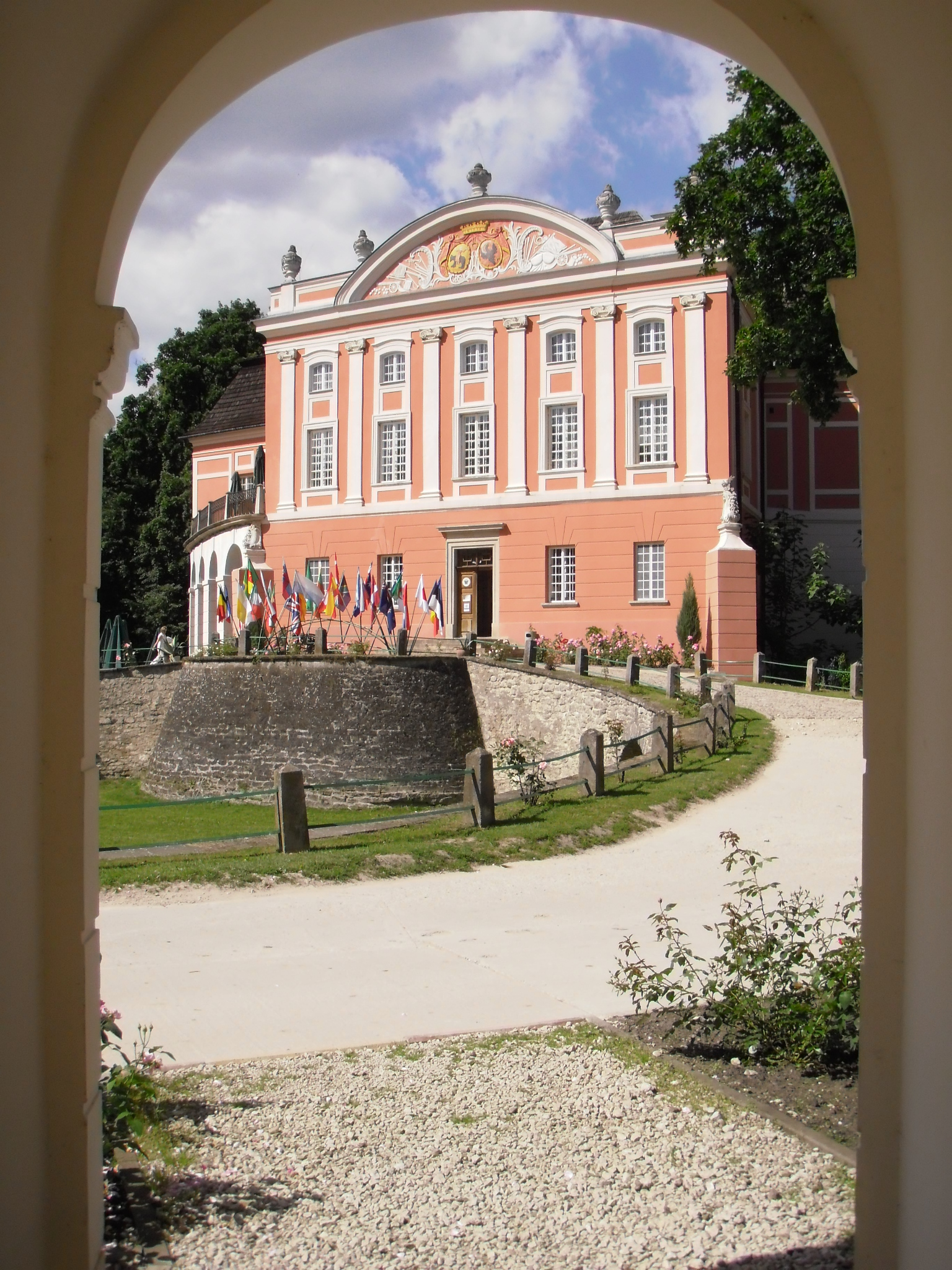 Kurozwęki - zamek, następnie pałac, 2 poł. XIV, XV, XVII, 2 poł. XVIII w.